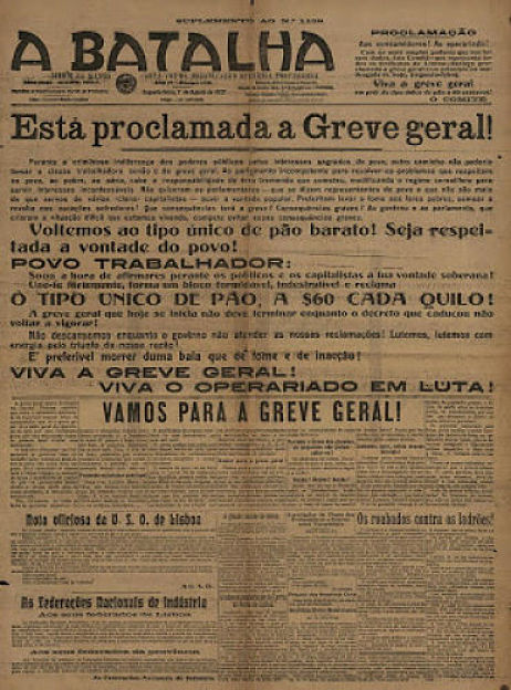 "A Batalha", journal anarcho-syndicaliste portugais, Ano IV, nº1.139 (Suplemento), de 7 de Agosto de 1922